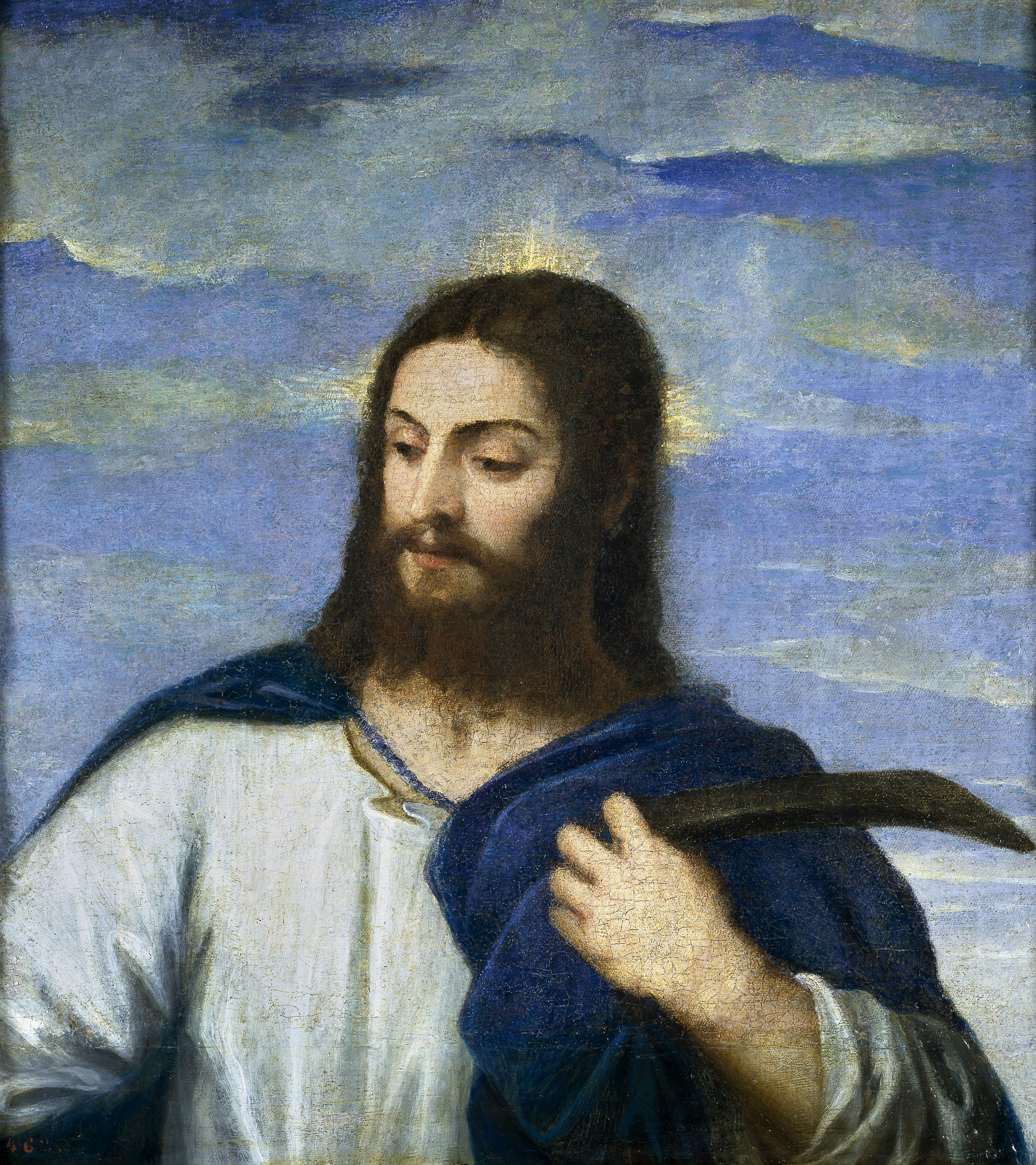 La obra representa a Jesucristo, y es un fragmento de un cuadro que tenía por tema el pasaje evangélico de la aparición de Cristo resucitado a Santa María Magdalena (Noli me tangere).